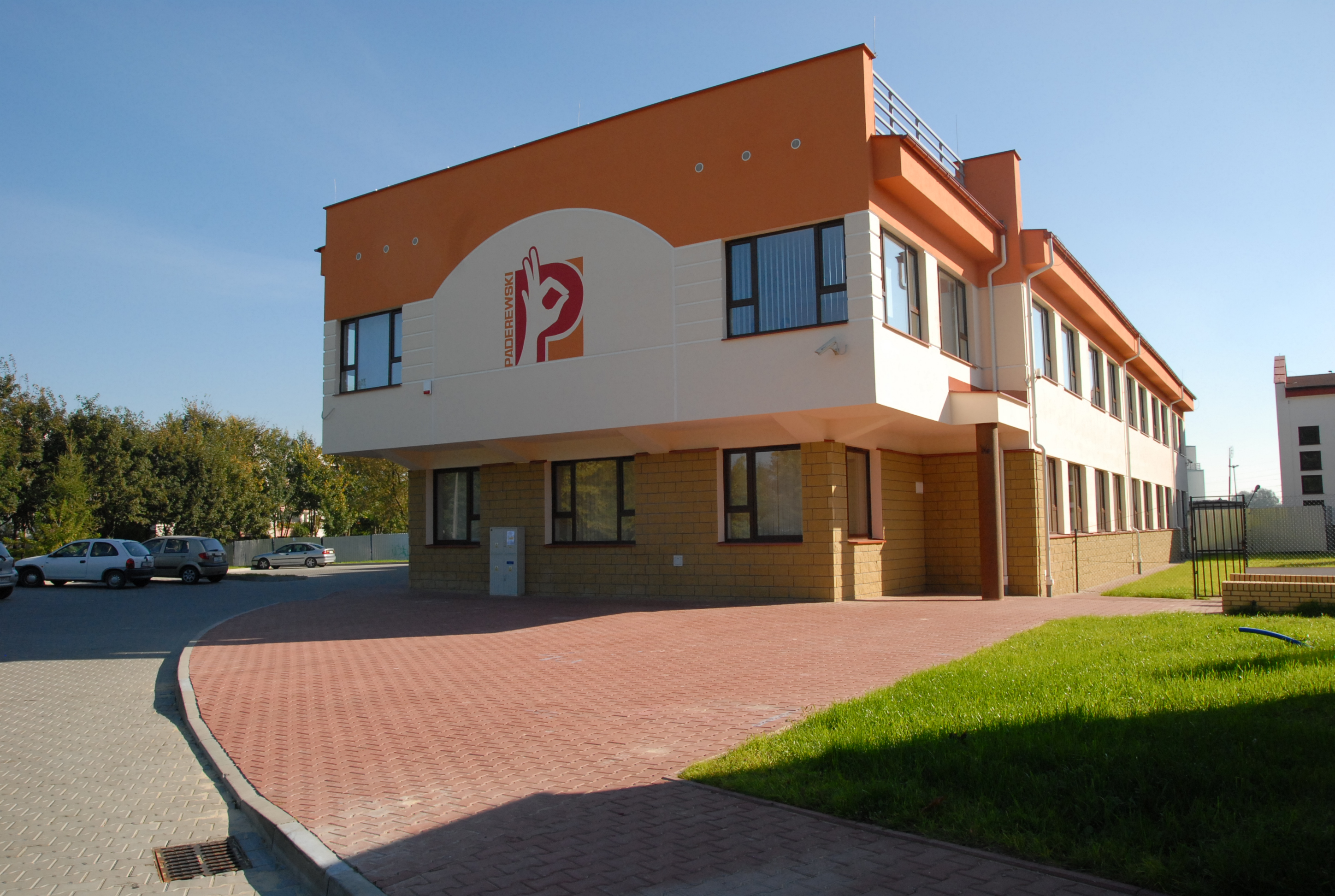 Budynek Międzynarodowej Szkoły Podstawowej "Paderewski" mieszczący się przy ulicy Symfonicznej 3a w Lublinie.